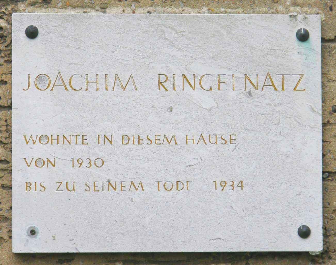 Gedenktafel für Joachim Ringelnatz. Brixplatz 11, Berlin-Westend.